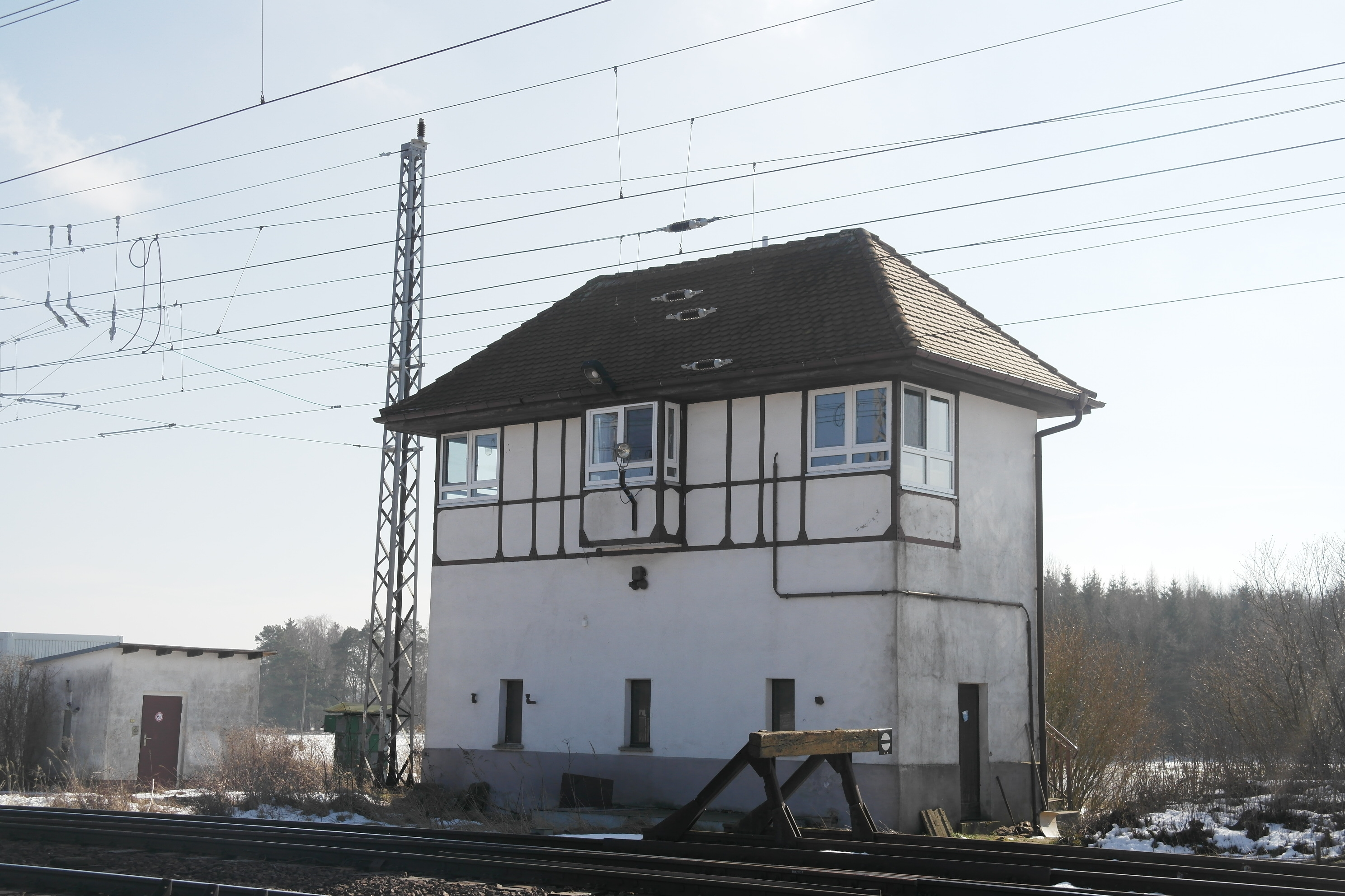 Bahnhof Wiesenburg, denkmalgeschütztes Stellwerk östlich des Bahnhofs